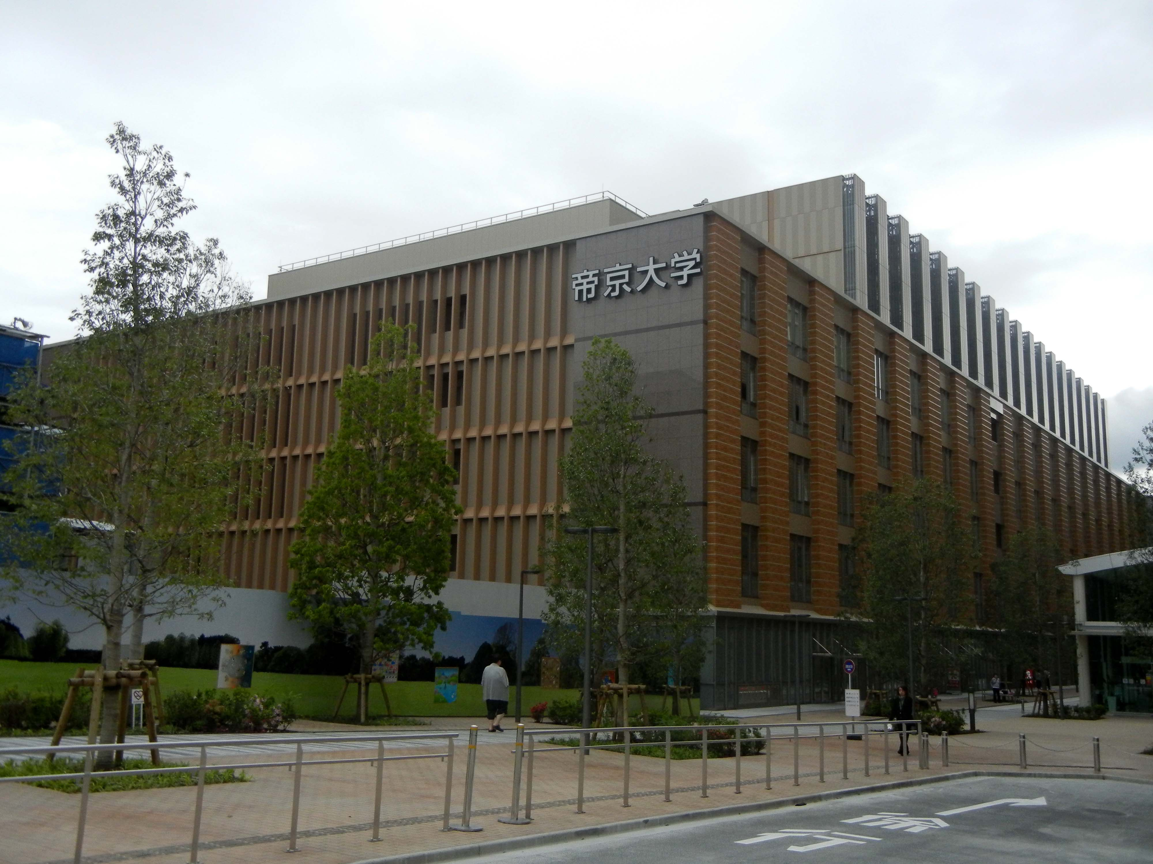 帝京大学板橋キャンパス 大学棟本館